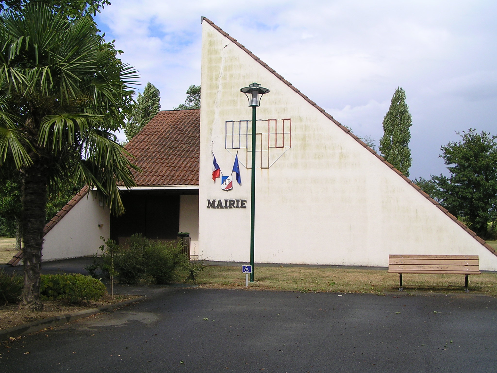 mairie de La Chapelle